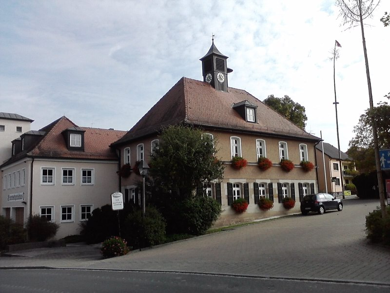 Rathaus Tuchenbach